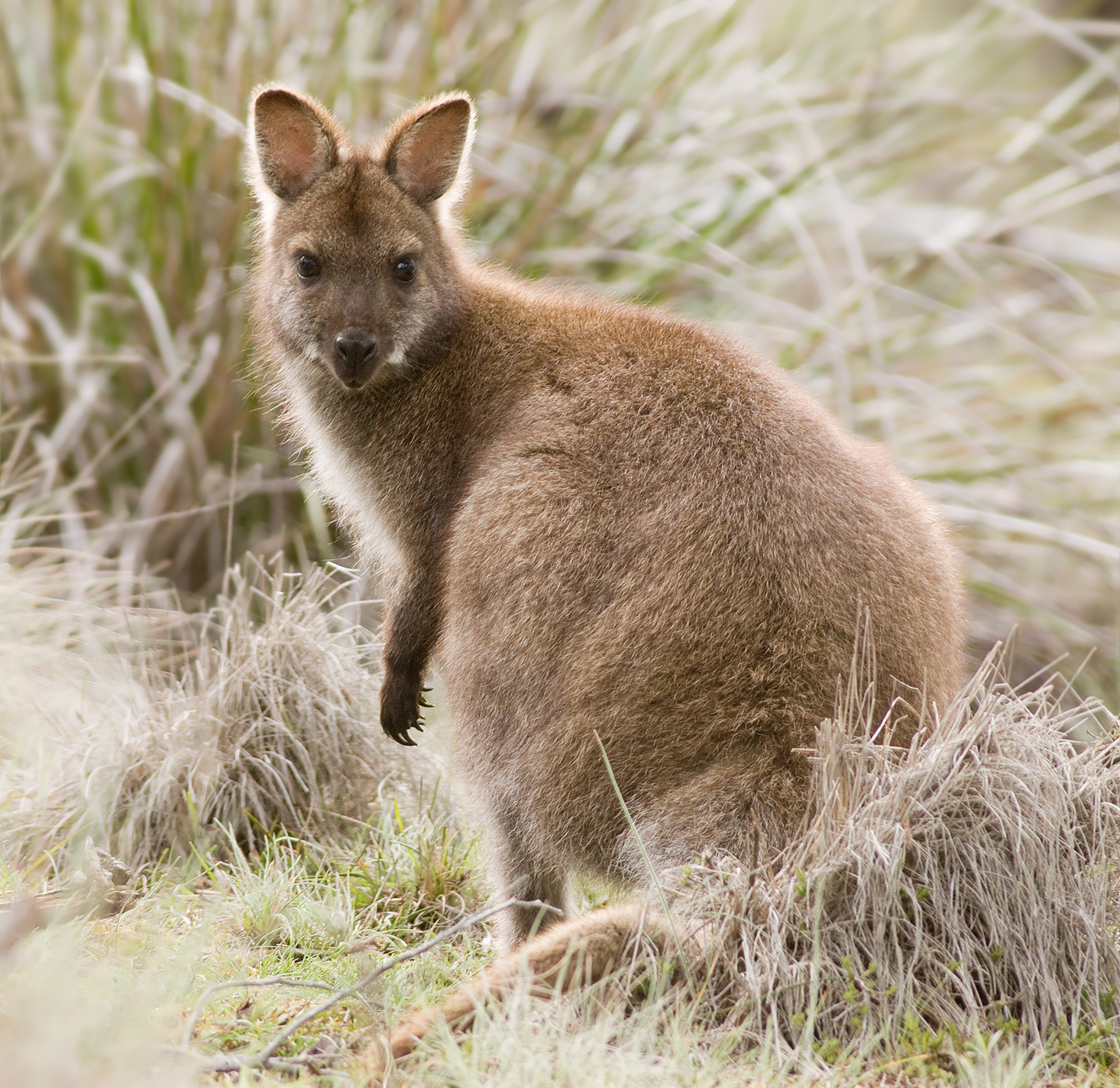 1.2 only